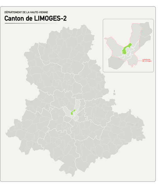 Carte du nouveau canton de Limoges-2.